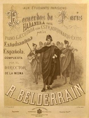 Couverture de la partition souvenir de la venue de l'Estudiantina Espagnola au Carnaval de Paris 1878.